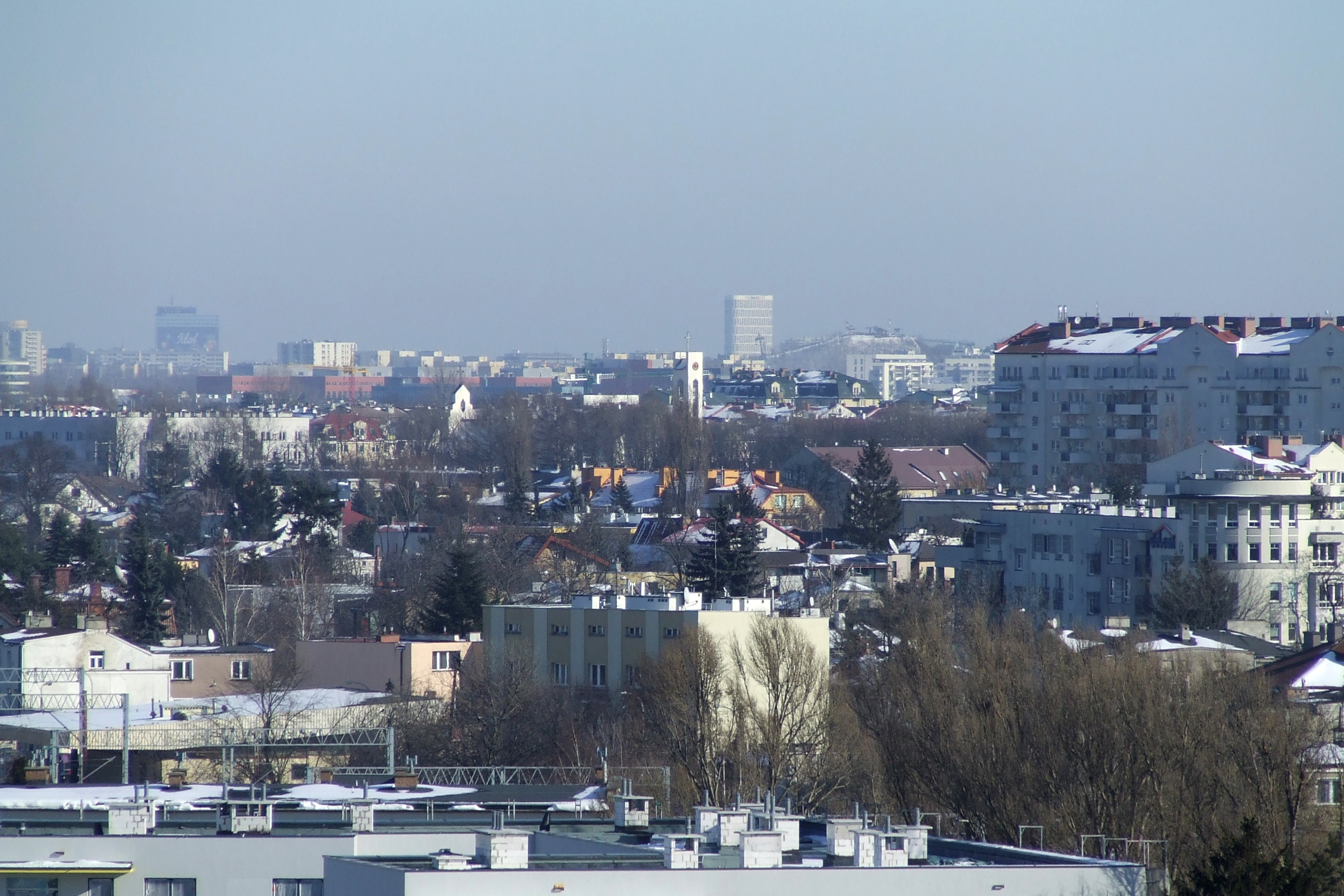 Ursus, Włochy, Ochota i Śródmieście widziane z 10 piętra bloku na osiedlu Niedźwiadek